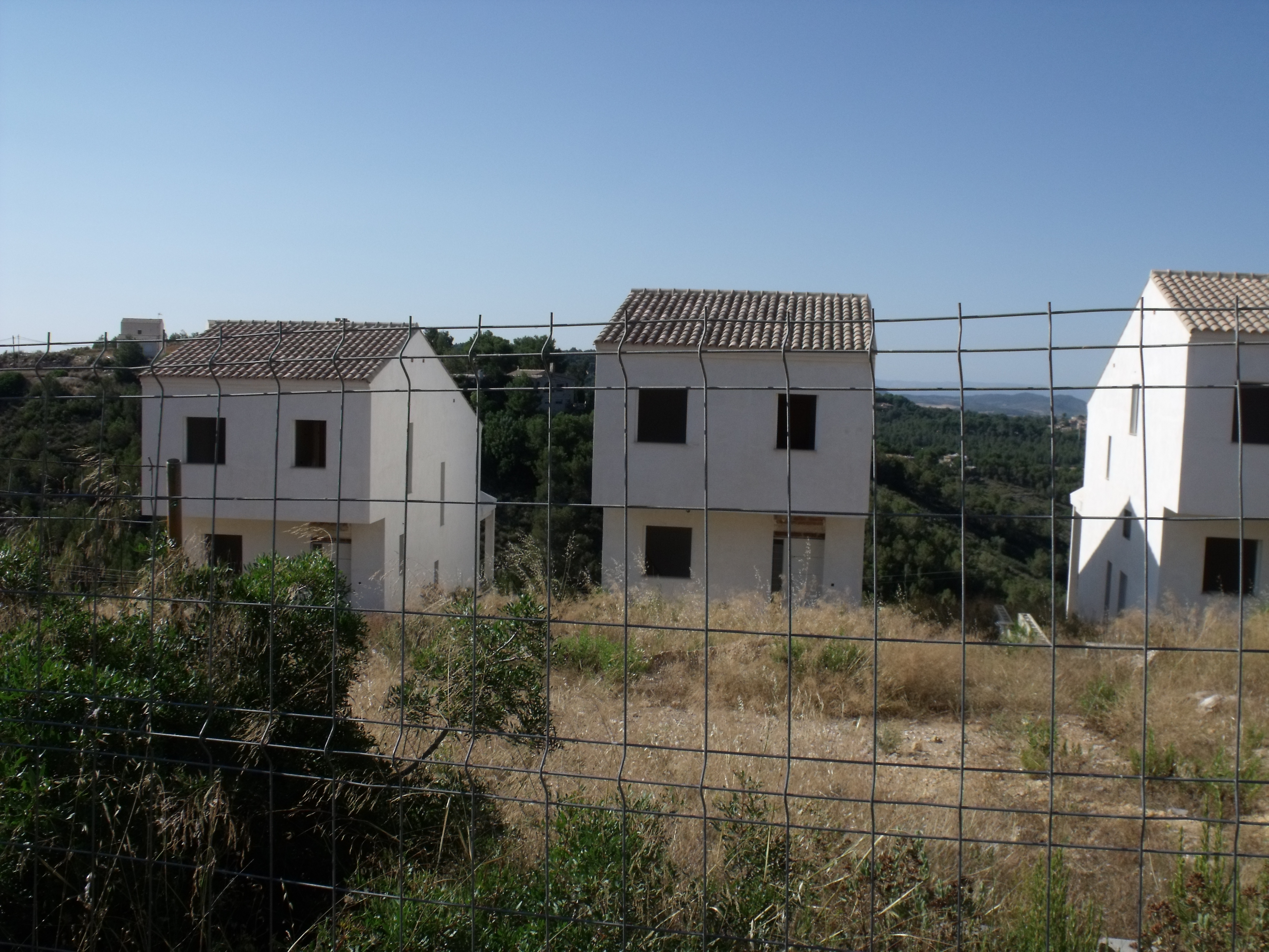 Cumbres de Calicanto. Viviendas de segunda residencia en la calle Paiporta, término municipal de Torrente. En el momento de la fotografía (julio de 2013), los edificios están inacabados debido a la burbuja inmobiliaria y la crisis de 2008.